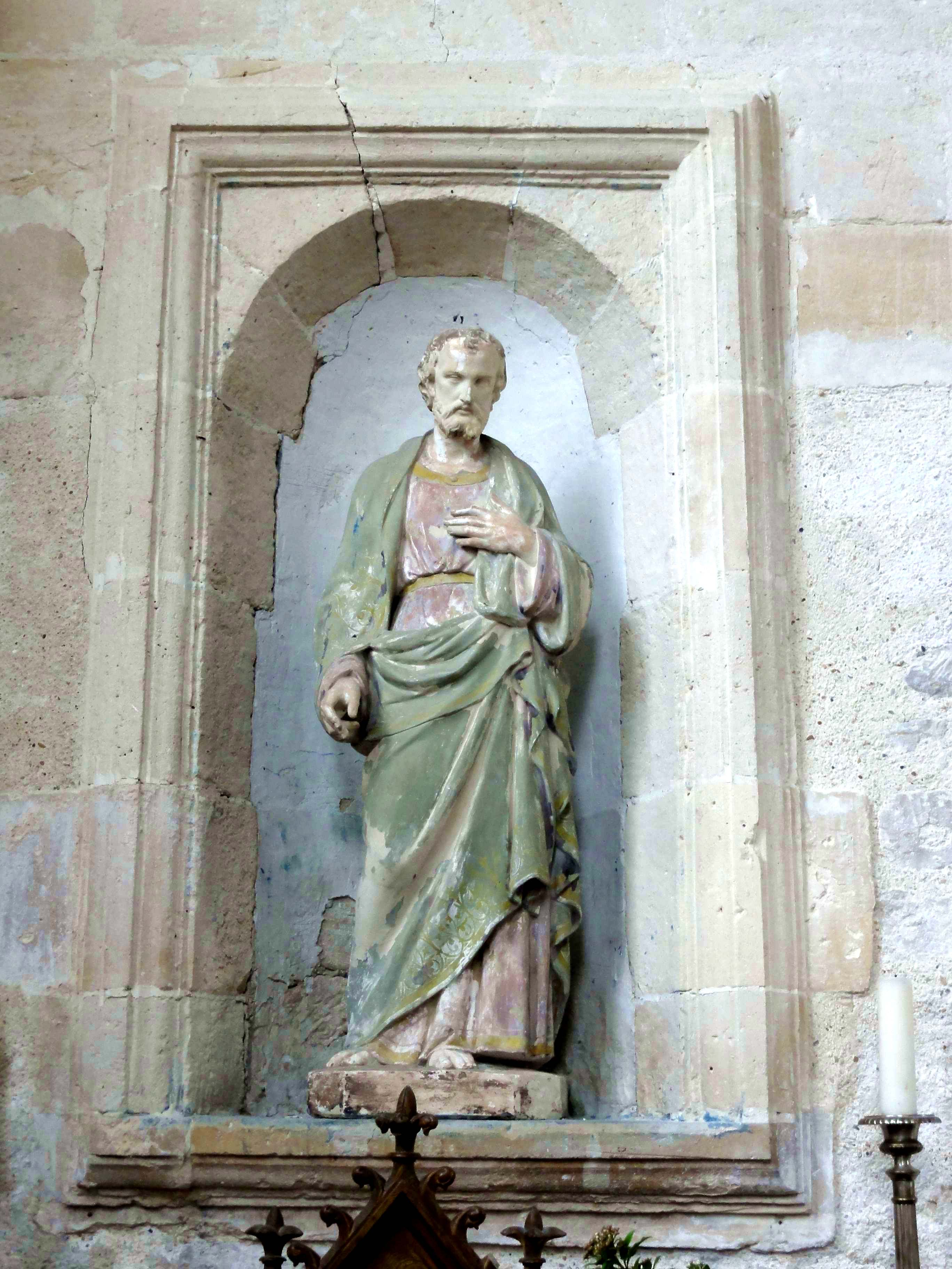 Croisillon nord, statue de saint Joseph.